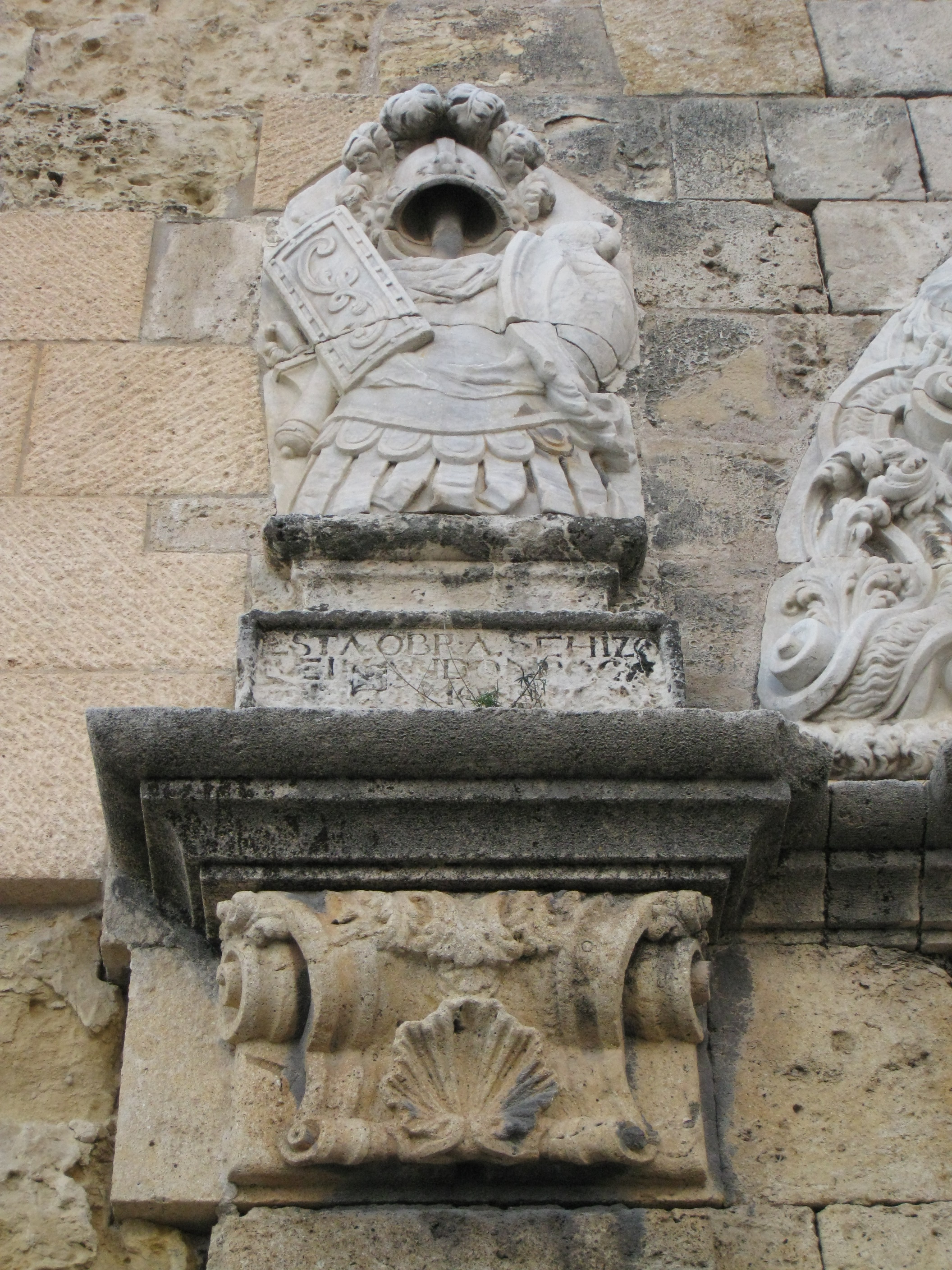 Muralles medievals de Tarragona